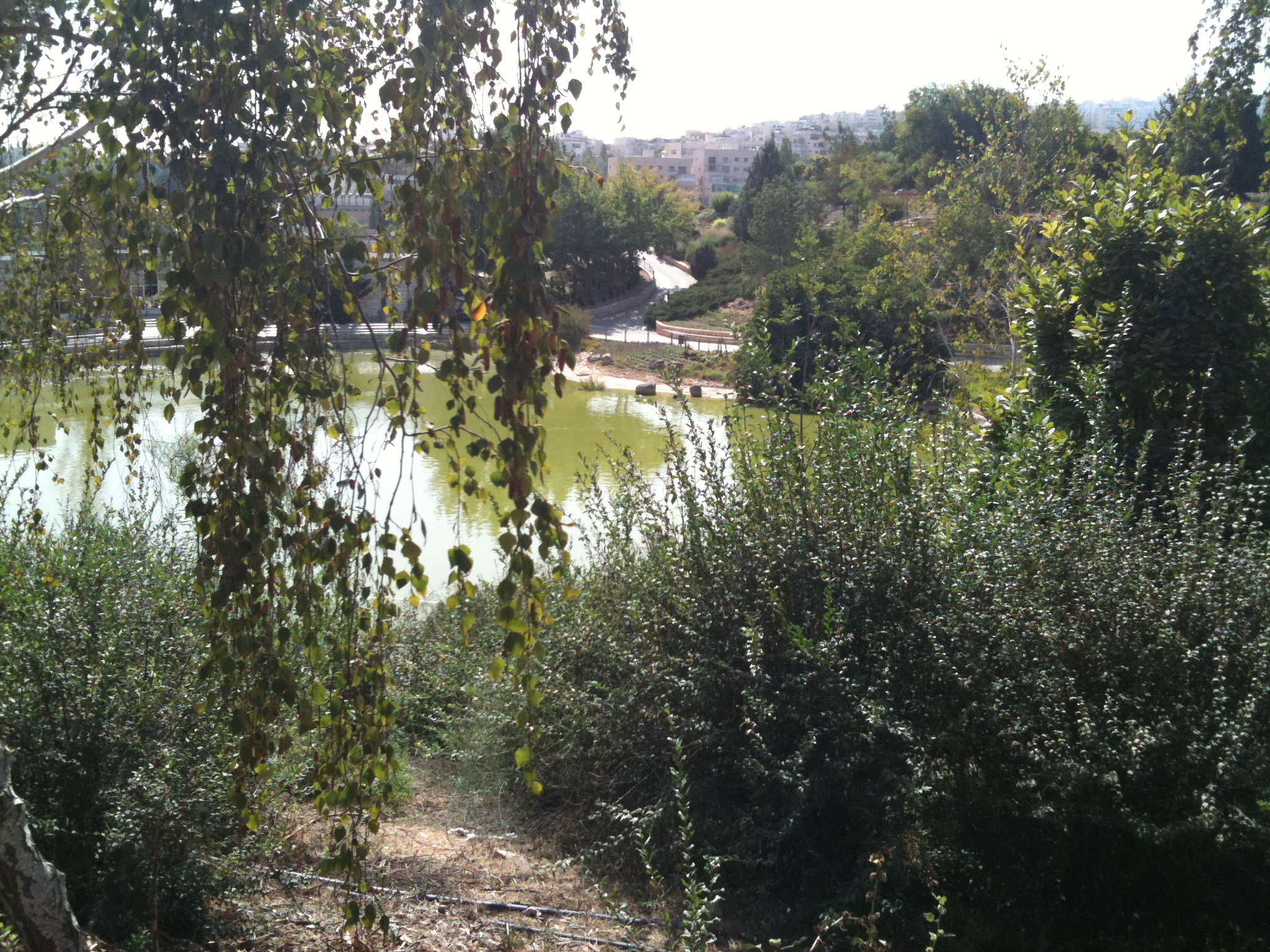 The Jerusalem Botanical Gardens, G. Ram, Jerusalem, Israel.הגנים הבוטניים של ירושלים, גבעת רם.